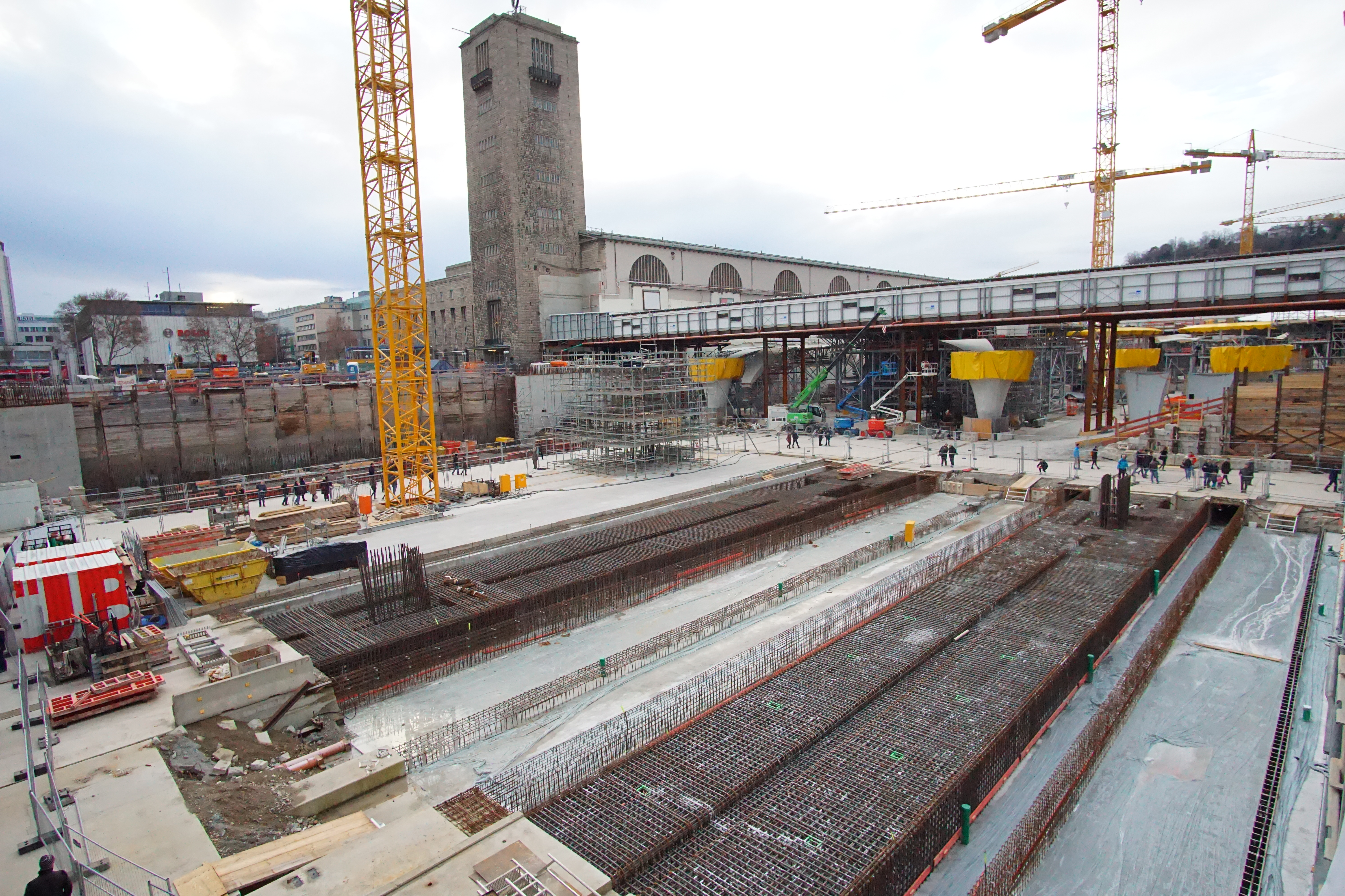 Tag der offenen Baustelle, Baugrube am Hauptbahnhof Stuttgart.